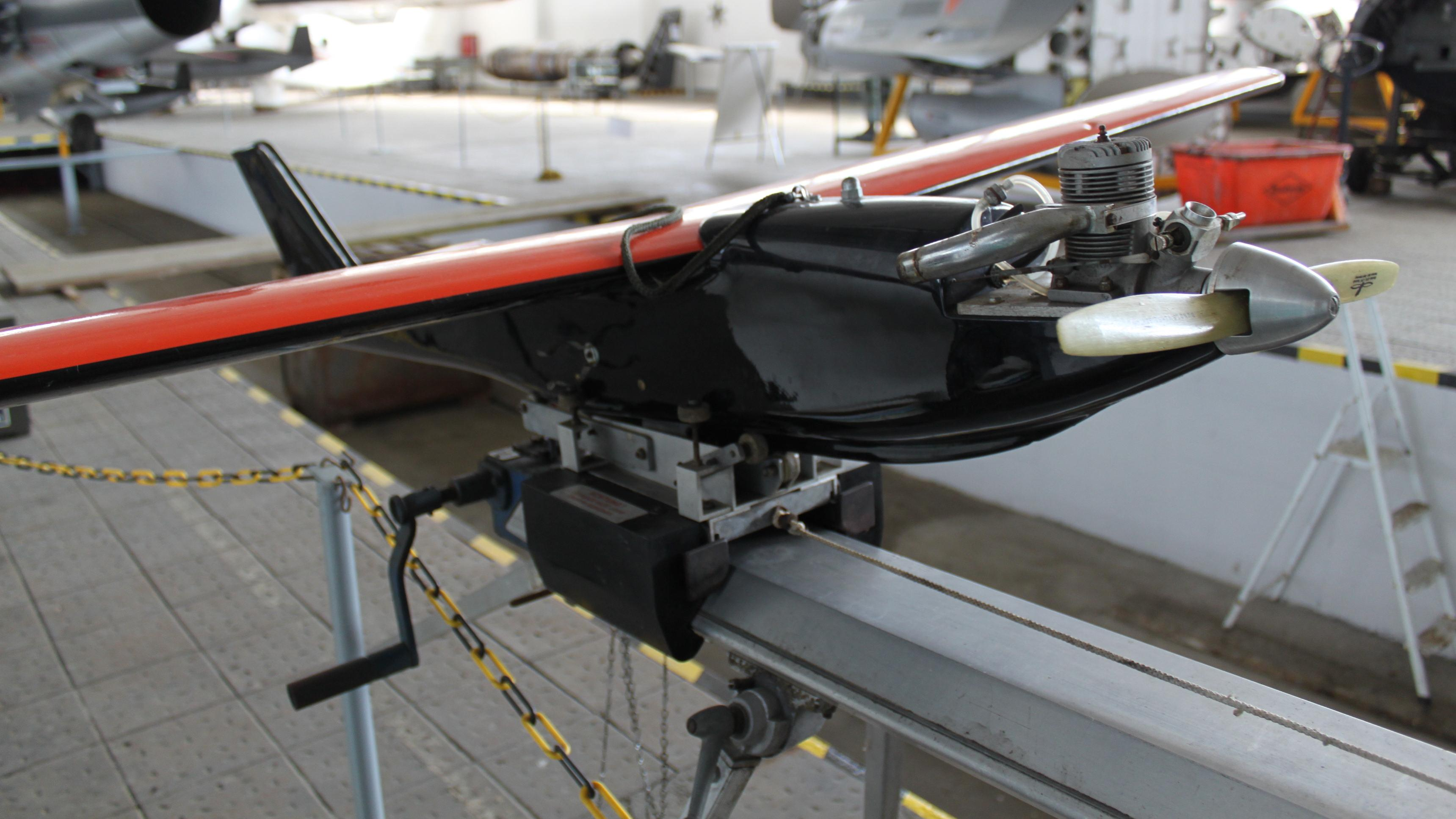 Klein-Ziel-Drohne KZD-2 (Zieldarstellungsdrohne) der Bundeswehr aus den 1980er Jahren als Flugziel bei der Ausbildung von Flakkanonieren (20 mm)